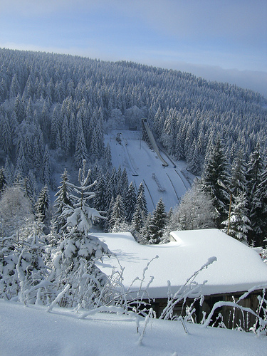 Schanzentisch Thüringenschanze Oberhof